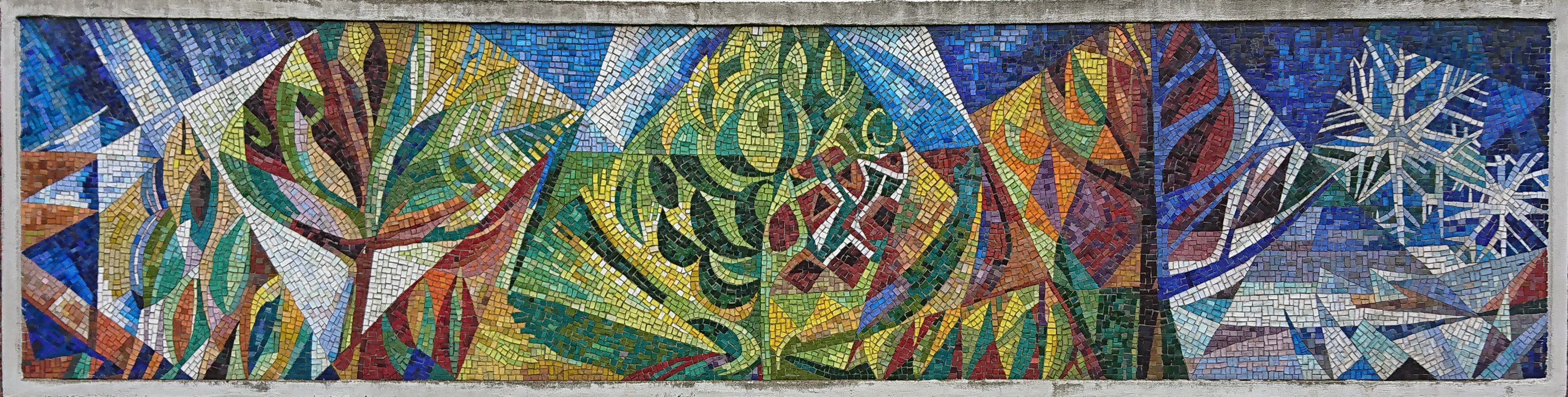 Gerhard Hausmann, Vier Jahreszeiten, Mosaik, 1963. Tangstedter Landstraße 143, Hamburg, über der Eingangstür